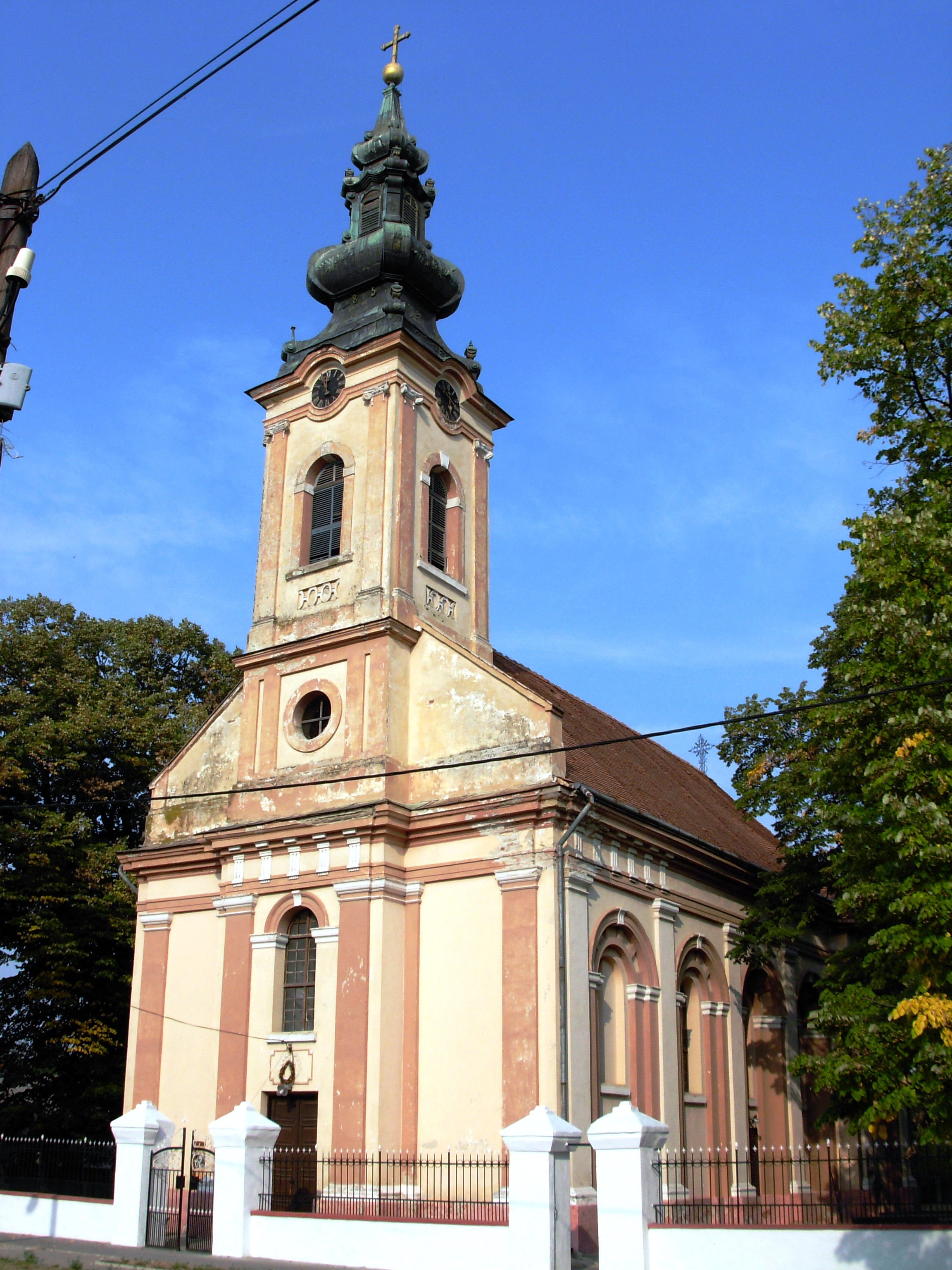 Pravoslavna crkva u Begeču.